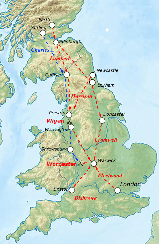 ウスターの戦いに至るまでの進軍路の図